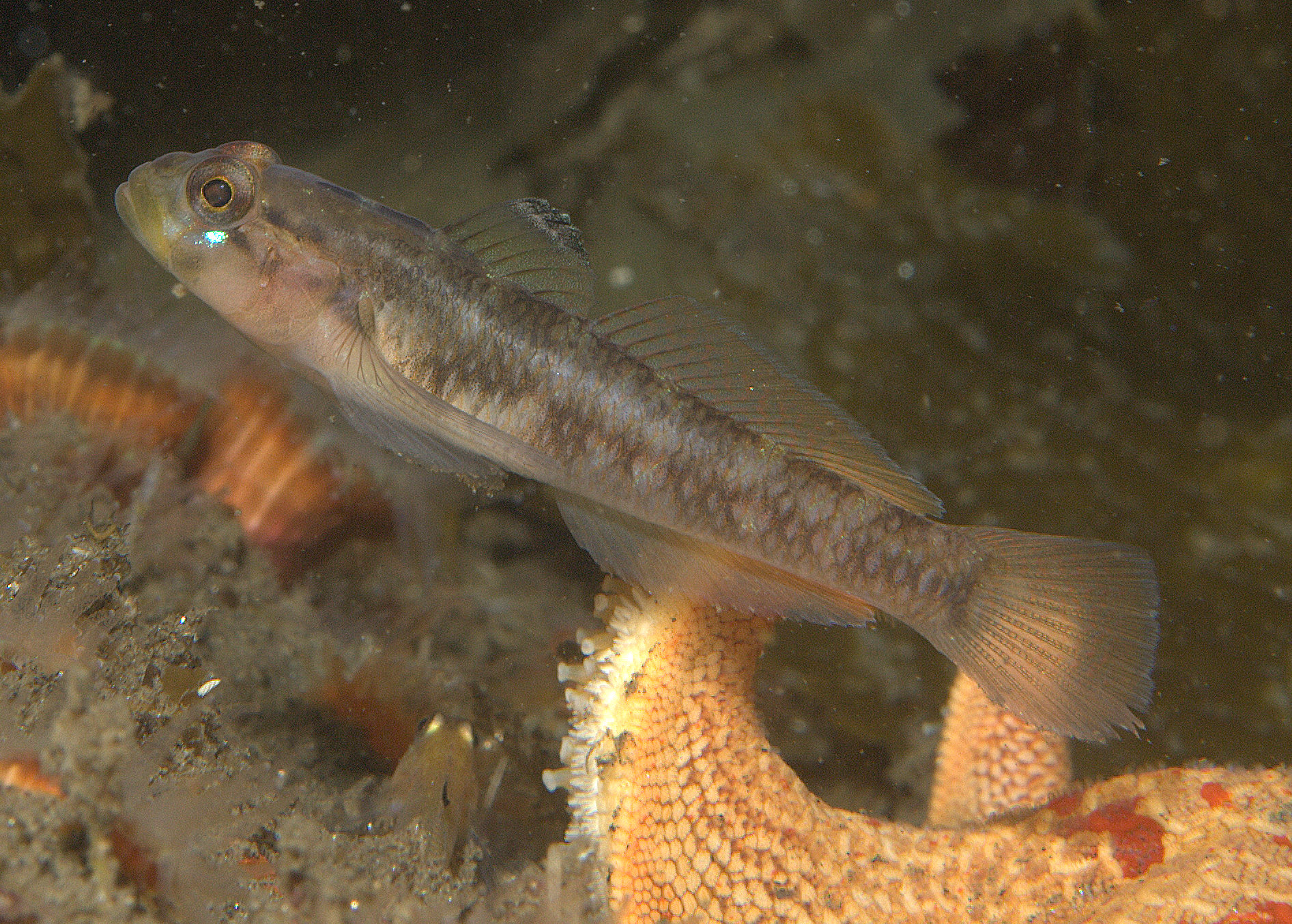 Blackeye Goby (Rhinogobiops nicholsii)